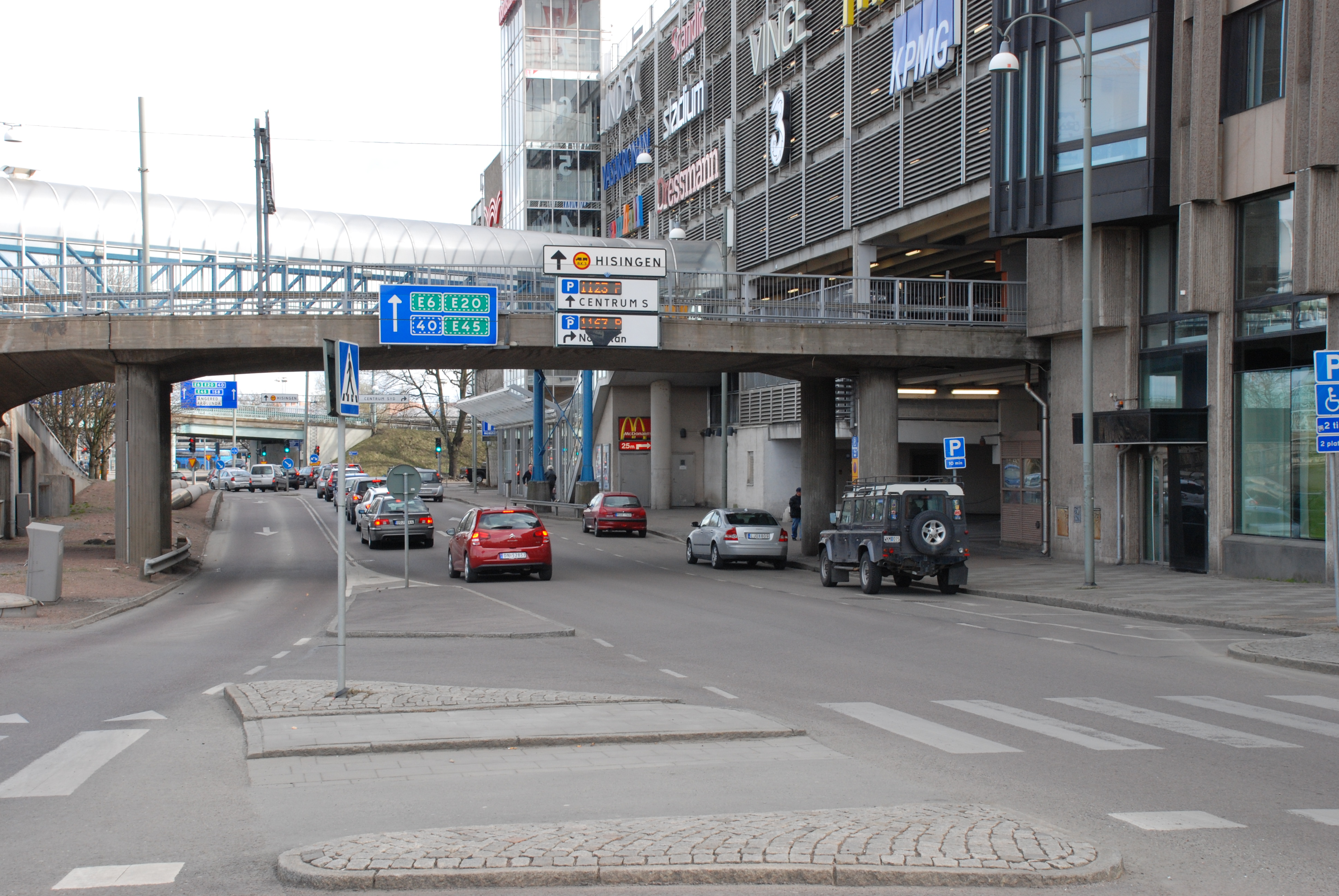 Kanaltorgsgatan i stadsdelarna Nordstaden och Gullbergsvass i Göteborg i riktning från Östra Hamngatan mot Nils Ericsonsgatan. Byggnaden till höger är Nordstans parkeringshus.